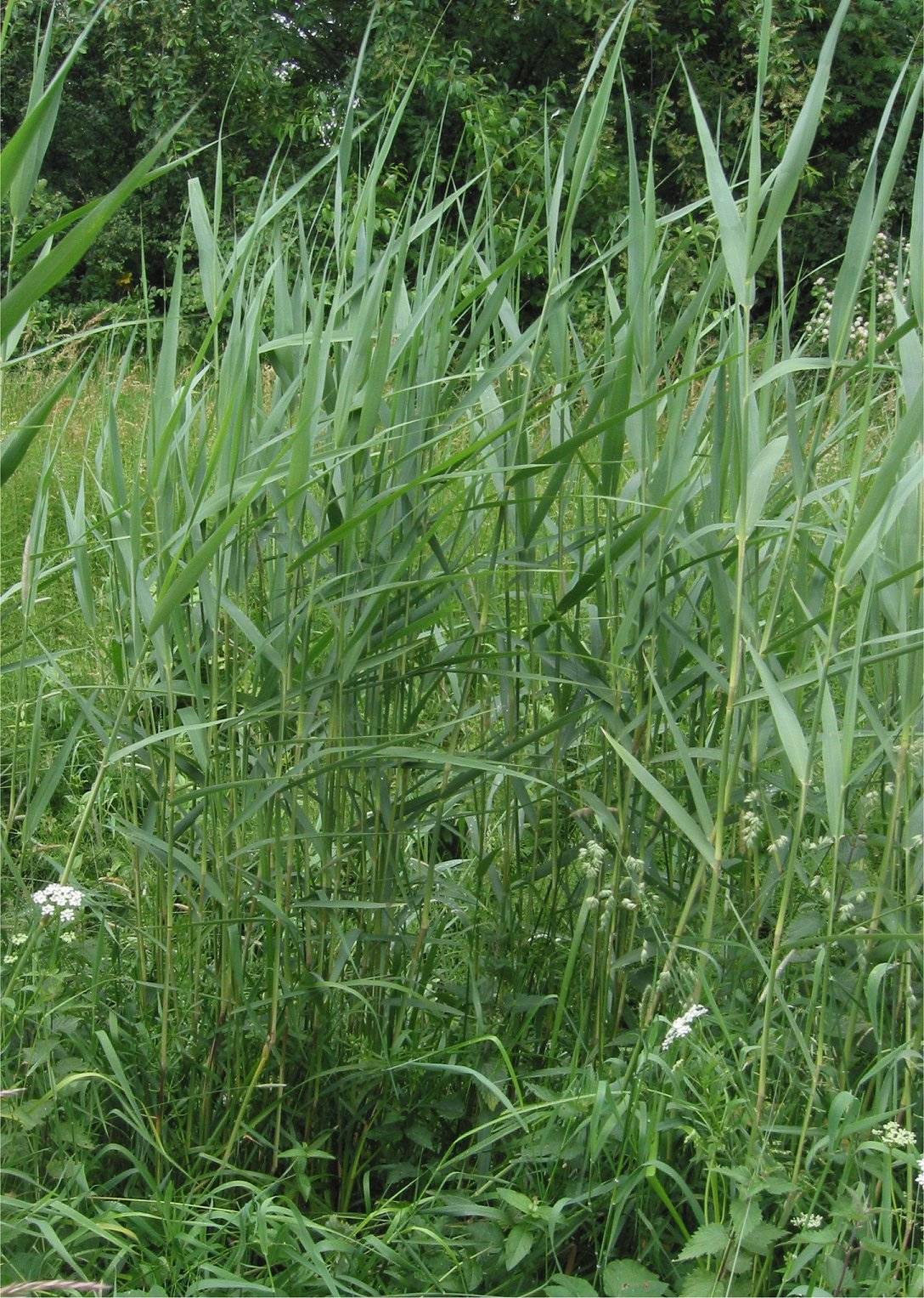 (Riet) Phragmites australis plants